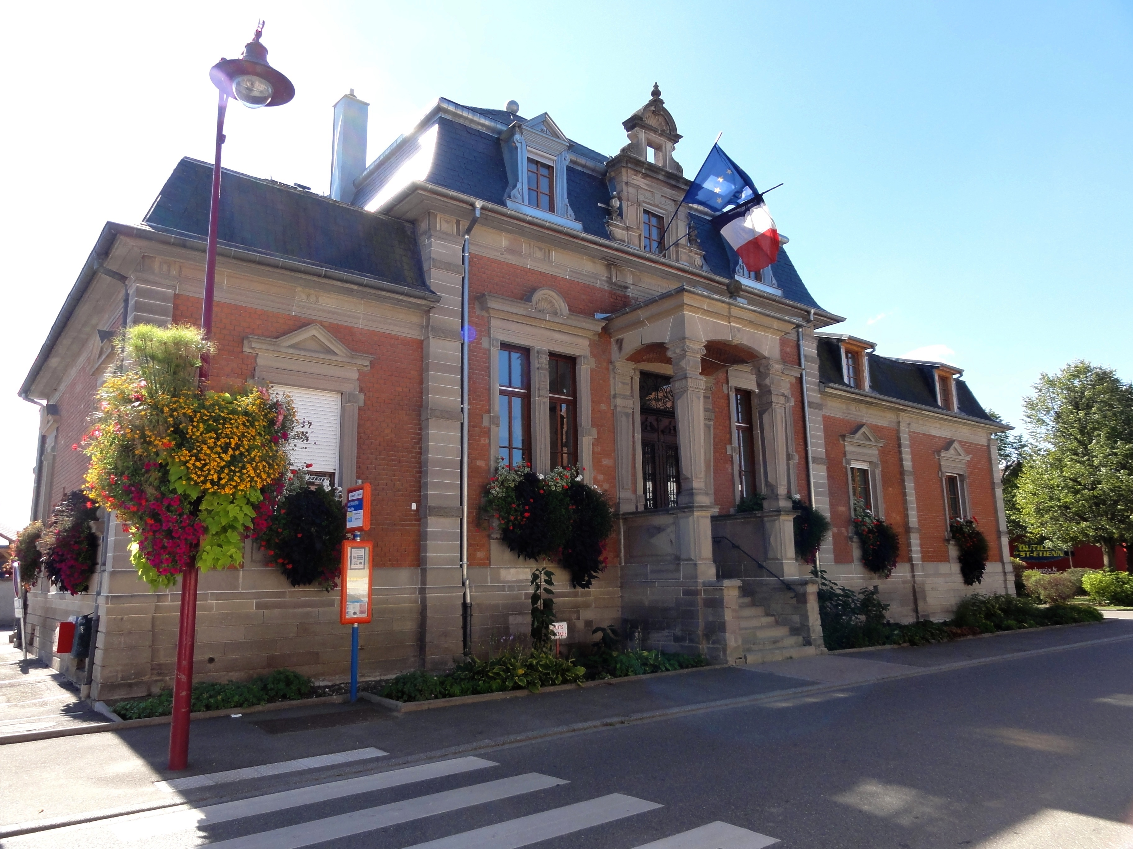 Alsace, Bas-Rhin, Hilsenheim, Mairie (1889), 2 place de la Mairie. .